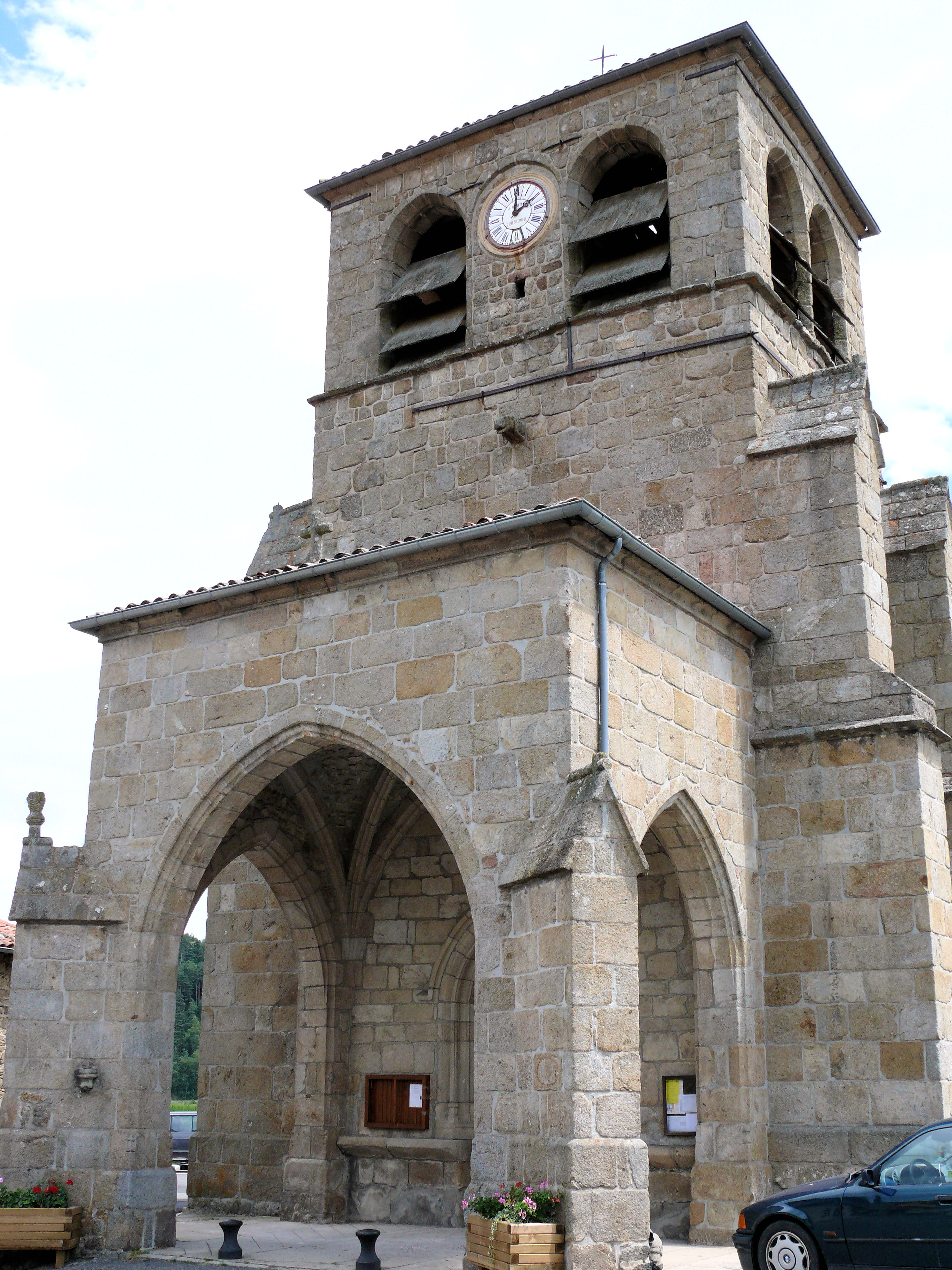 Gumières - Eglise Saint-Barthélemy avec son porche